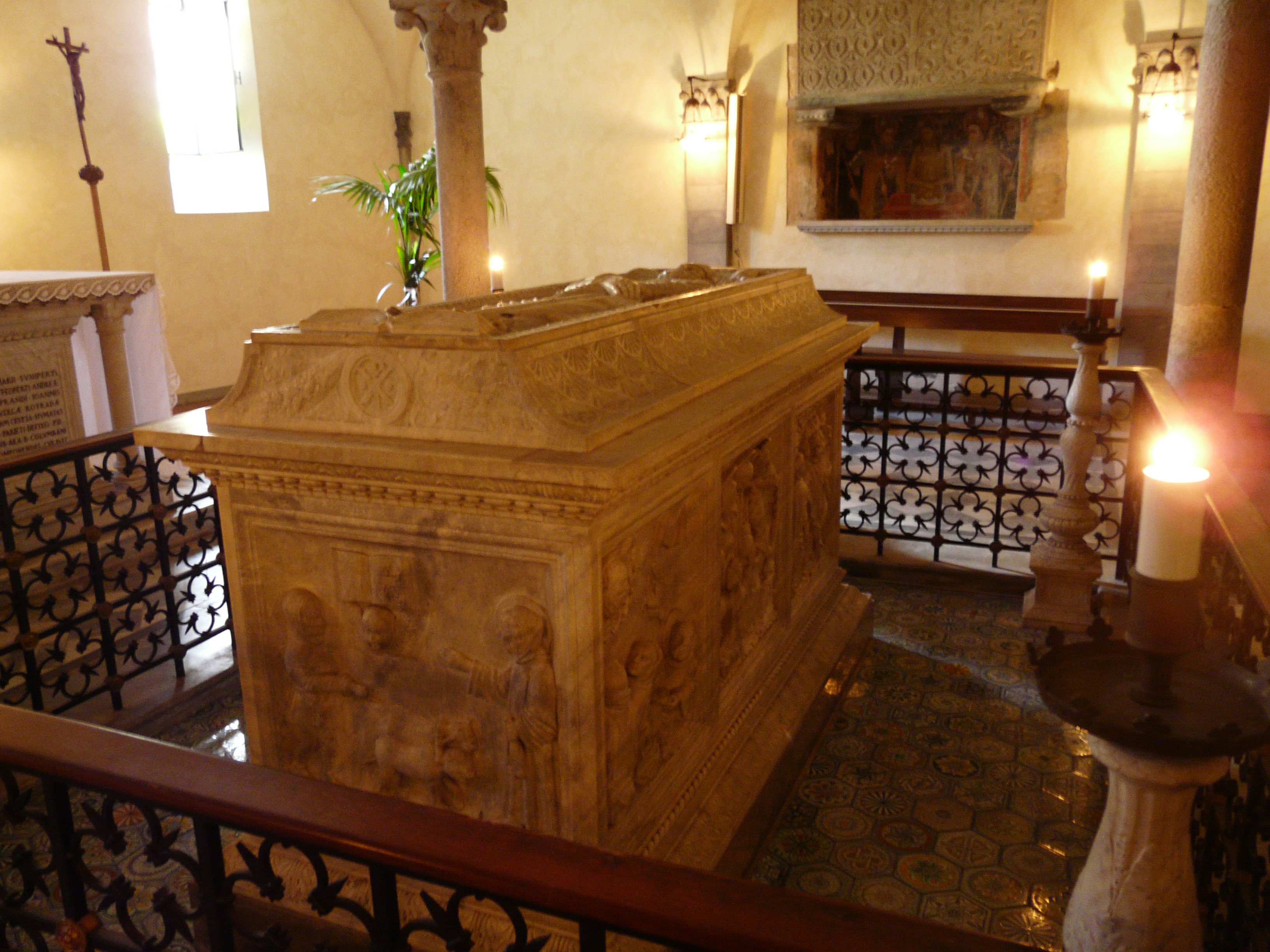 Immagini dell'abbazia di San Colombano di Bobbio, Emilia-Romagna, Italia